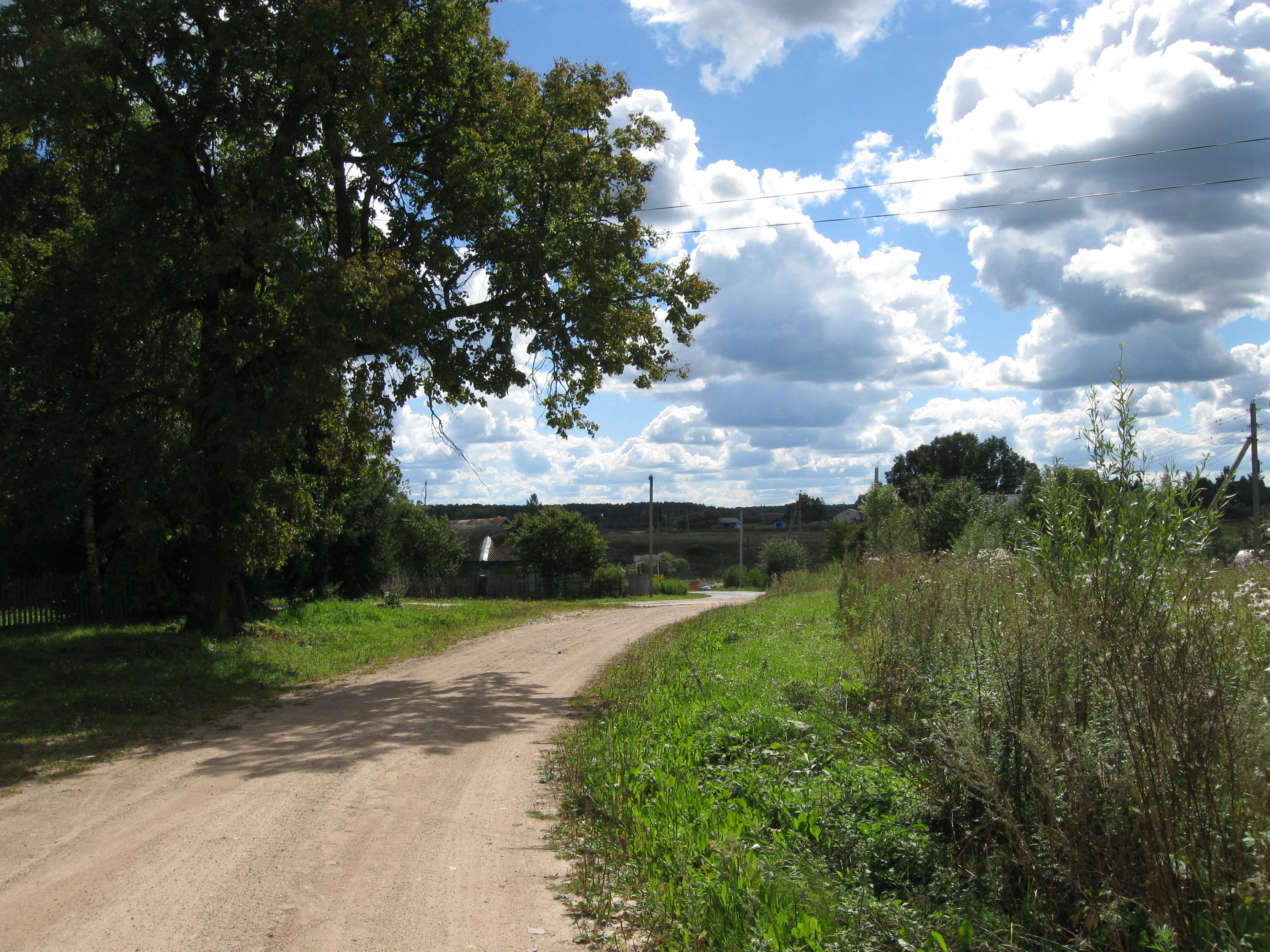 Шанский завод. Вид от сельсовета